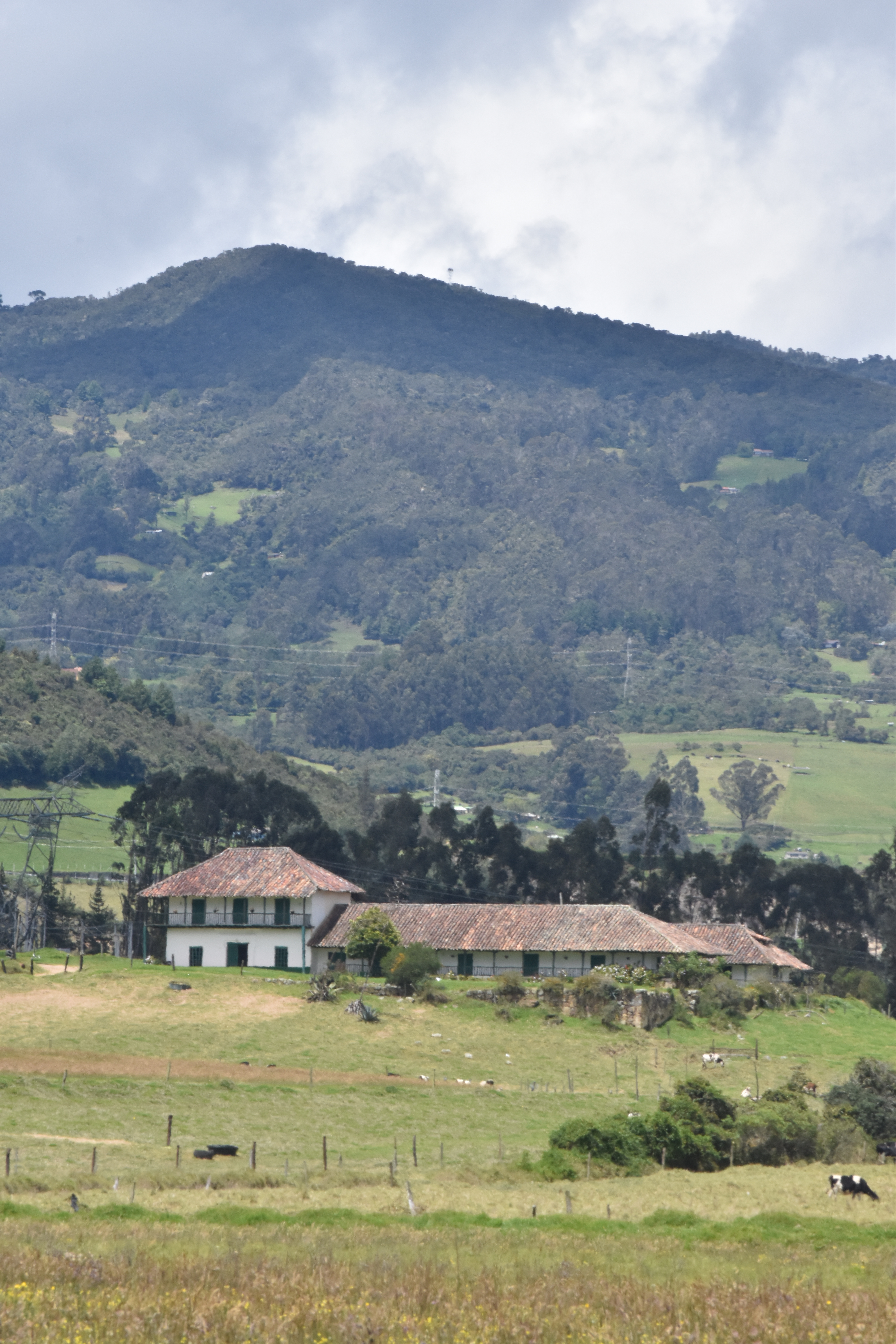 Casa de los descendientes del encomendero de Sopó Francisco Galeano.